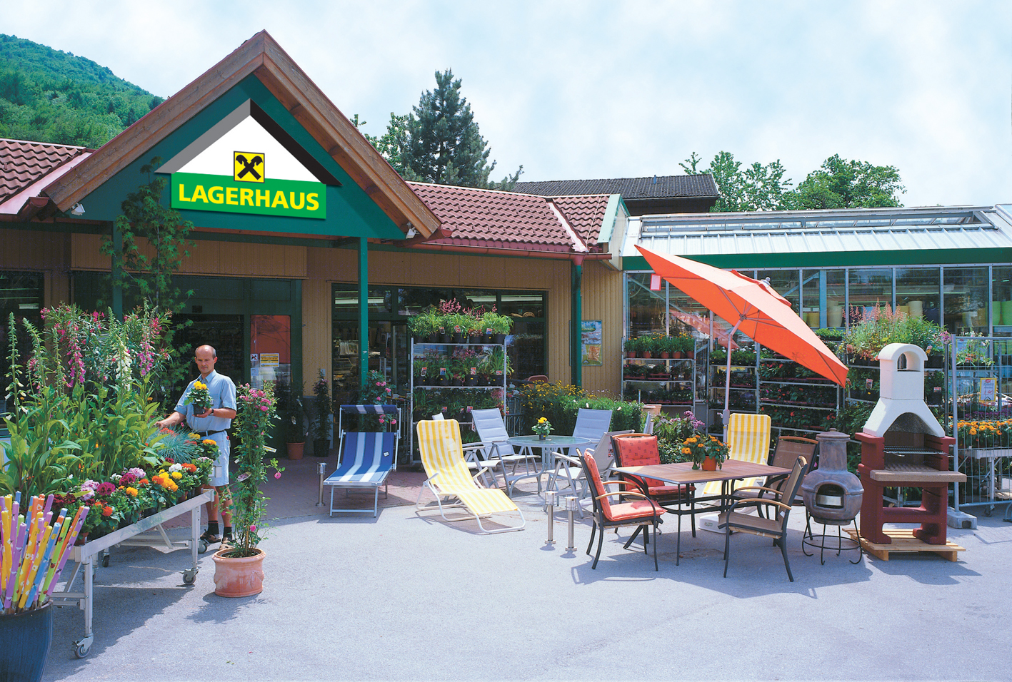 Lagerhaus in Elsbethen